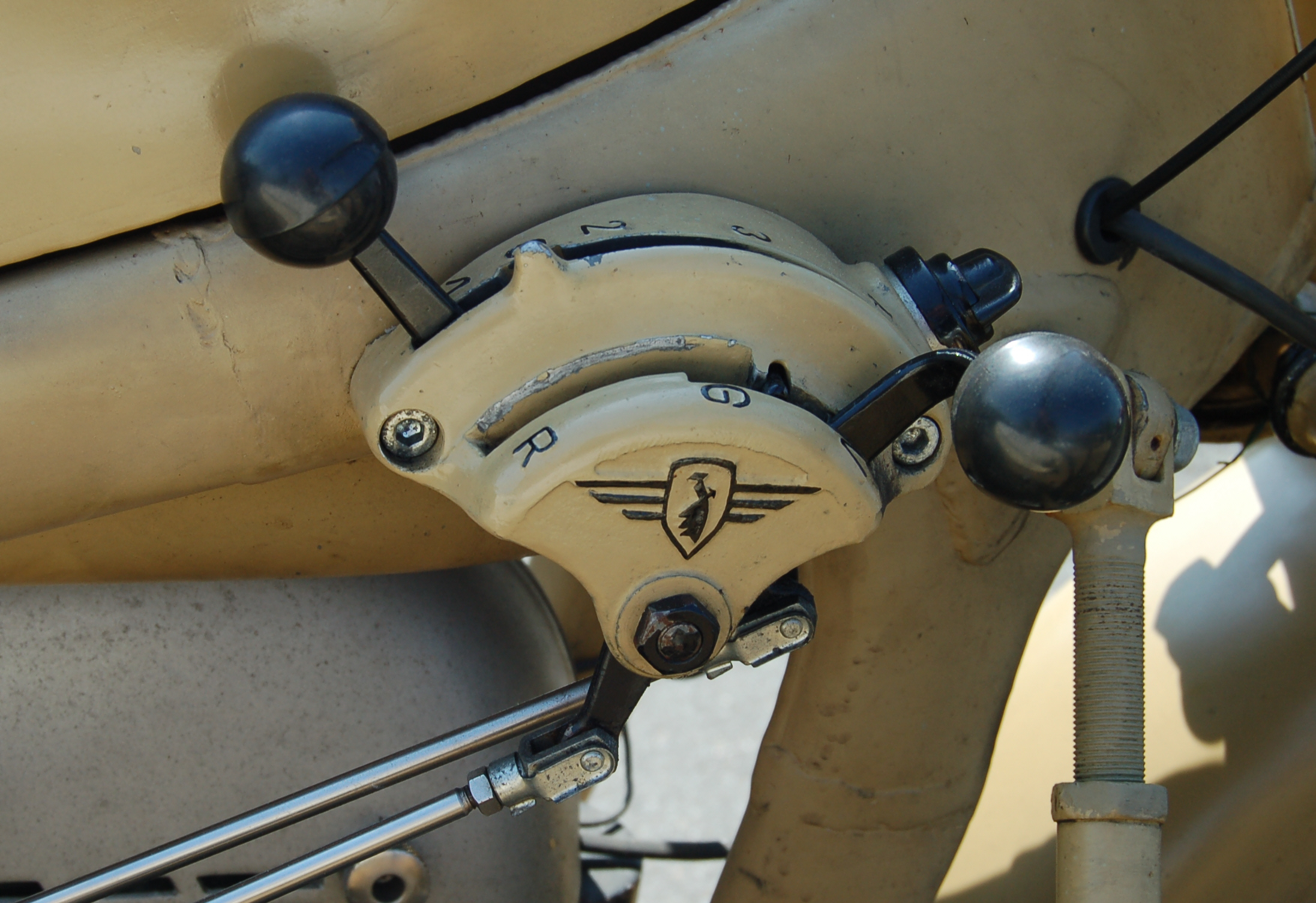 Handschaltung einer Zündapp KS 750